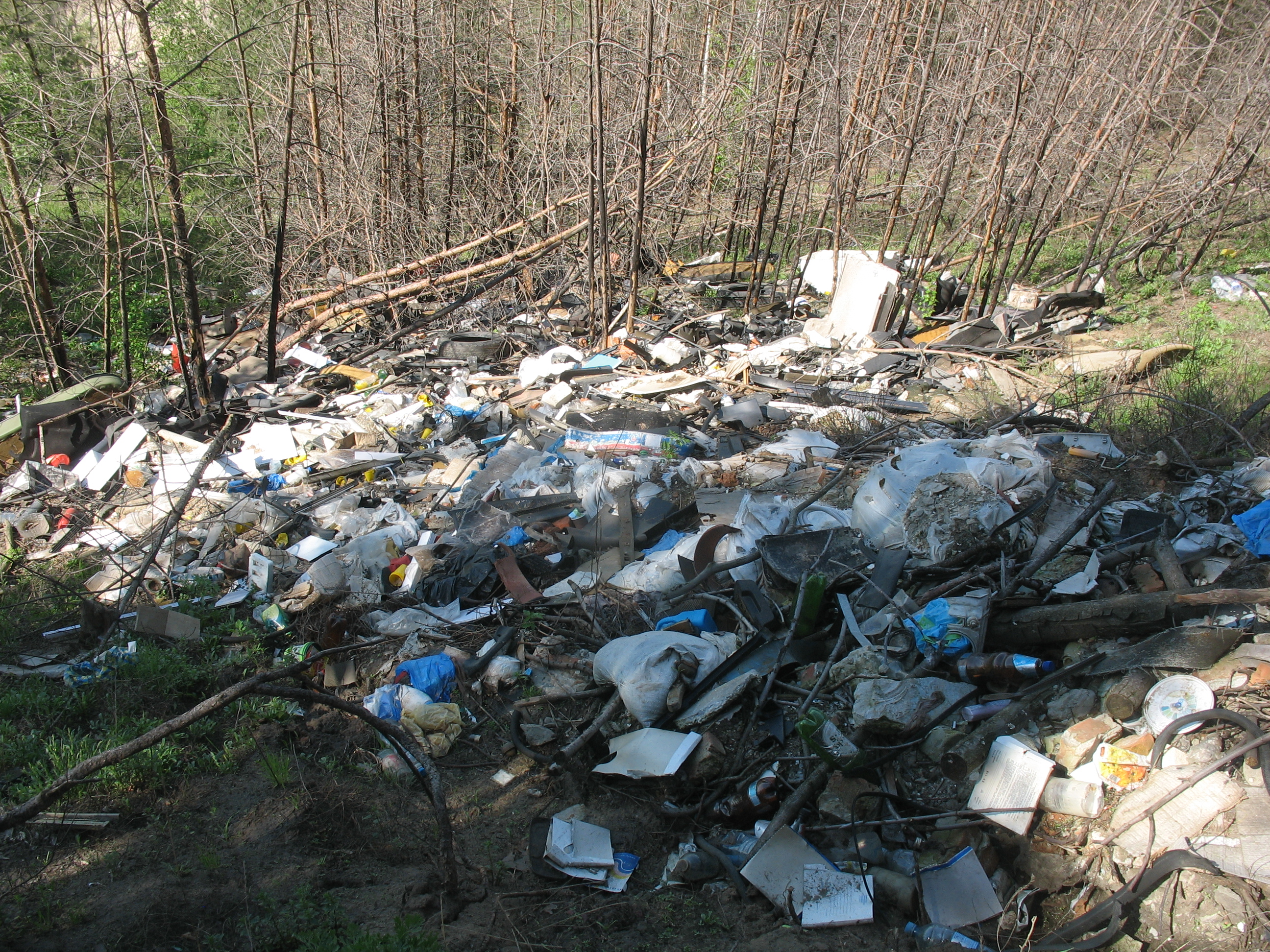 Свалка